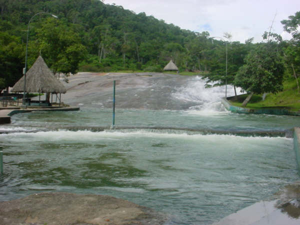 "Tobogan de La Selva" Municipio Atures, Estado Amazonas-Venezuela